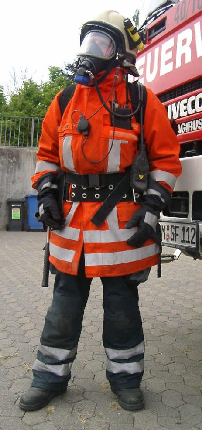 Atemschutzgeräteträger der Feuerwehr - Photo selbst erstellt In dem Feuerwehrschutzanzug des Landes Niedersachsen. Die Schutzkleidung ist von Bundesland zu Bundesland anders!!!